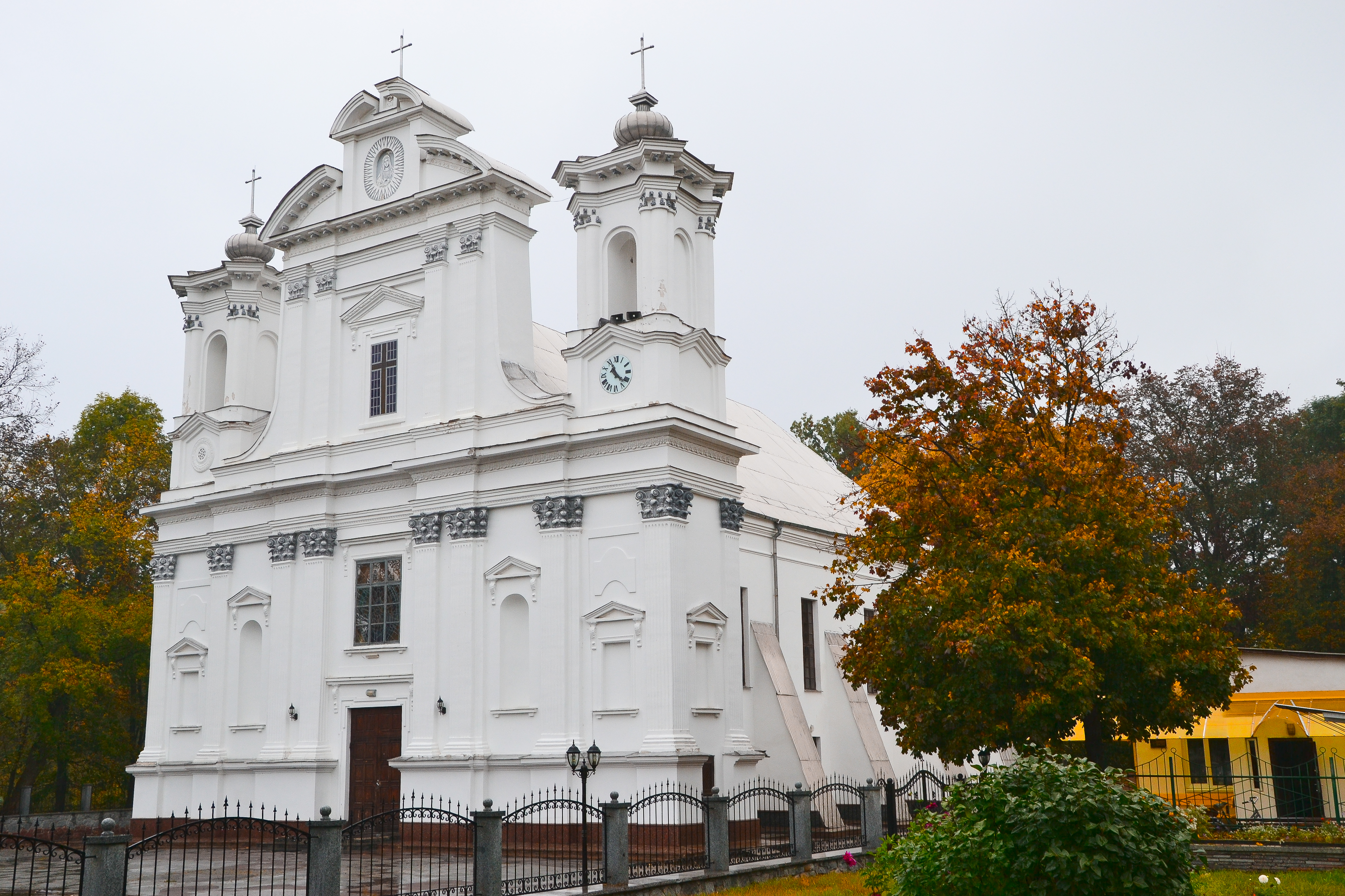 Костьол, Коростишів, вул. Дарбіняна, 7